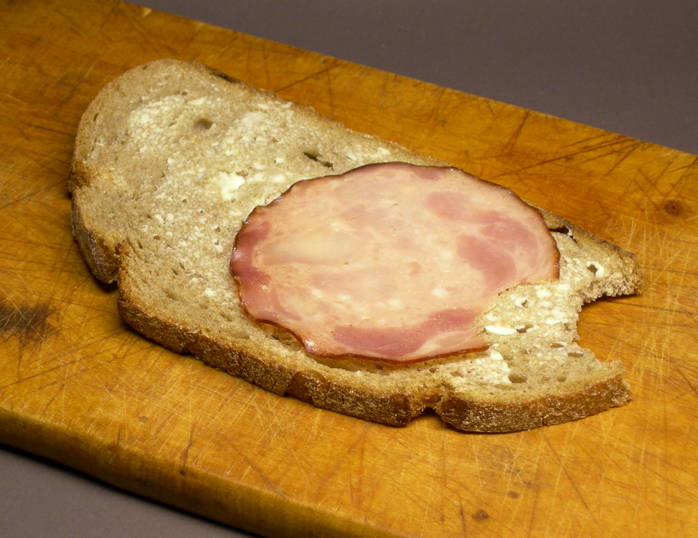 Schiebewurst